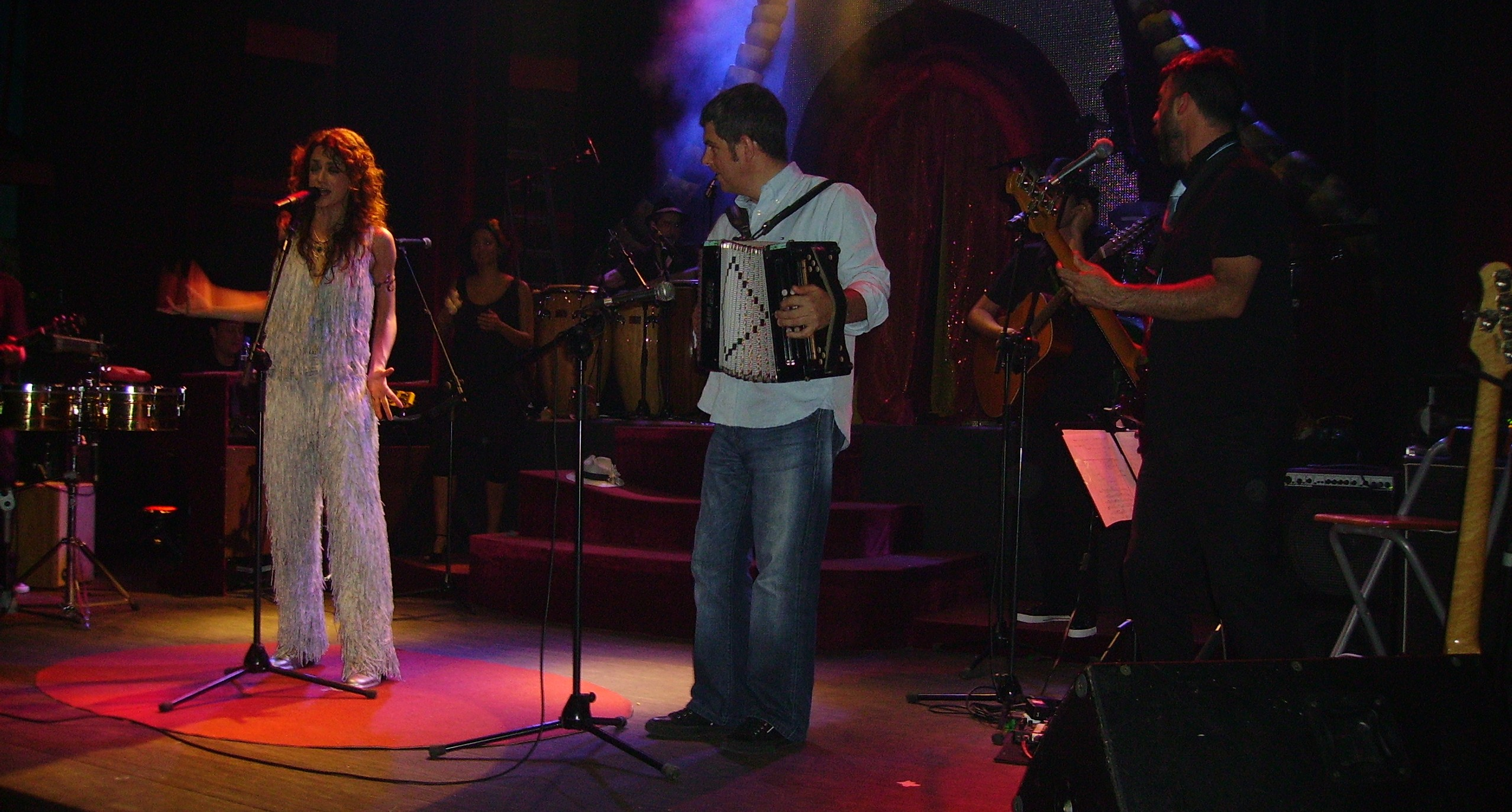 El bilbaíno acompañó a la zaragozana durante la última parte del concierto en el Kafe Antzokia (13 de junio de 2008). Más información en Coolpable